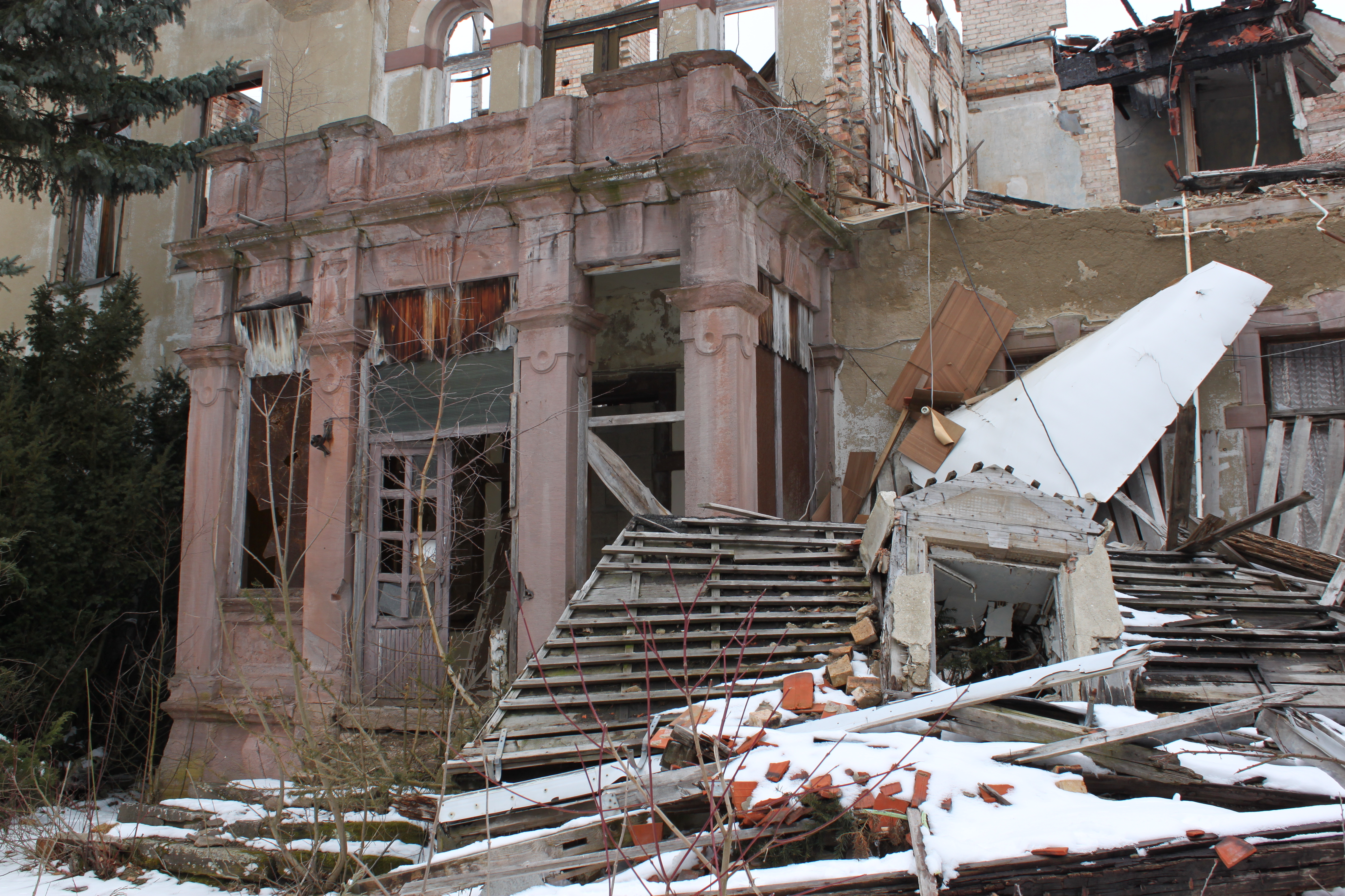 Jagdschloss Rathsfeld, Terrasse des 2005 ausgebrannten Corps de Logis, Mittelbau von 1908